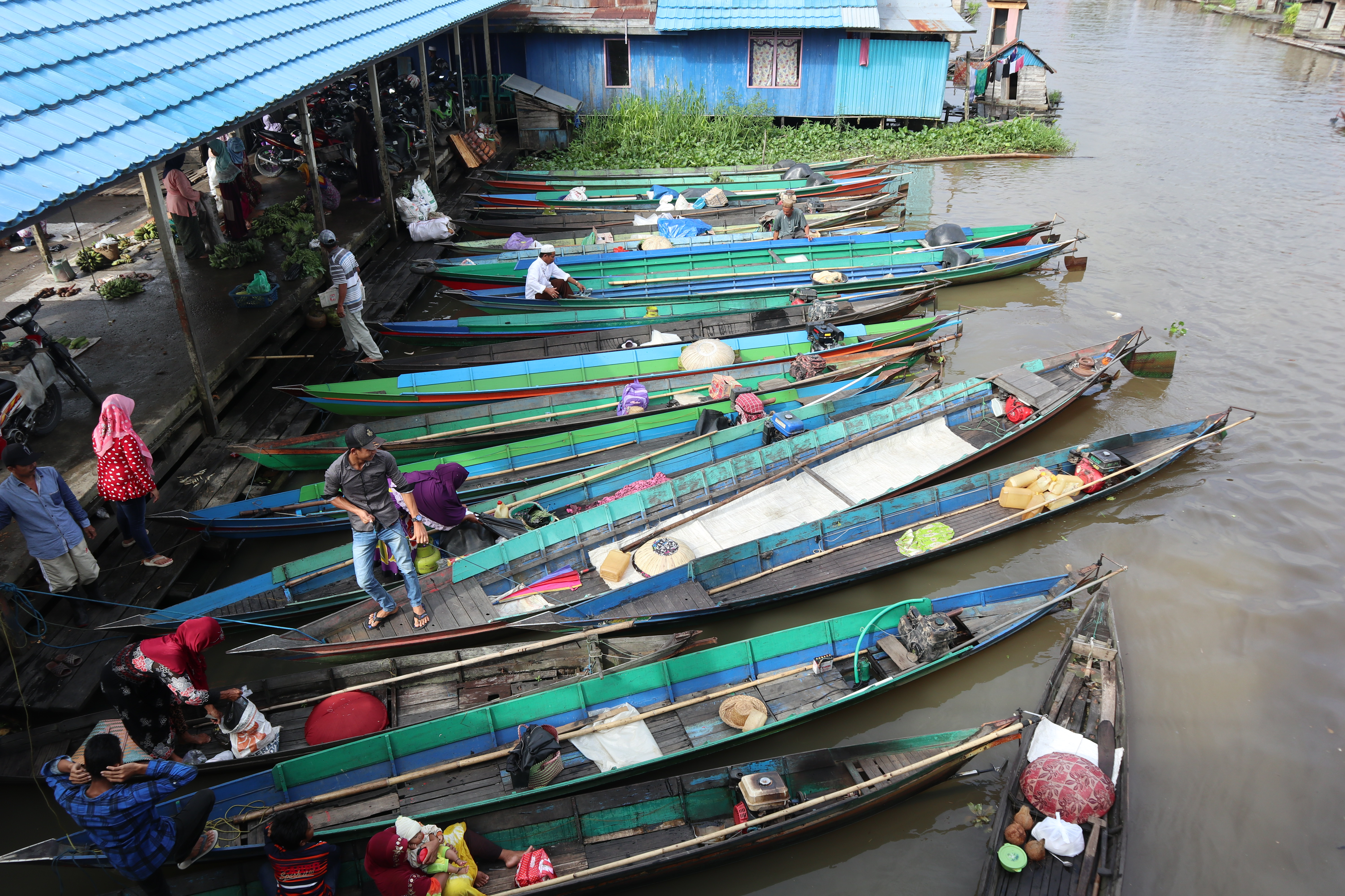 Perahu kelotok sedang bersandar di dermaga Pasar Rabu desa Sungai Buluh, kecamatan Labuan Amas Utara, Kabupaten Hulu Sungai Tengah, Kalimantan Selatan.